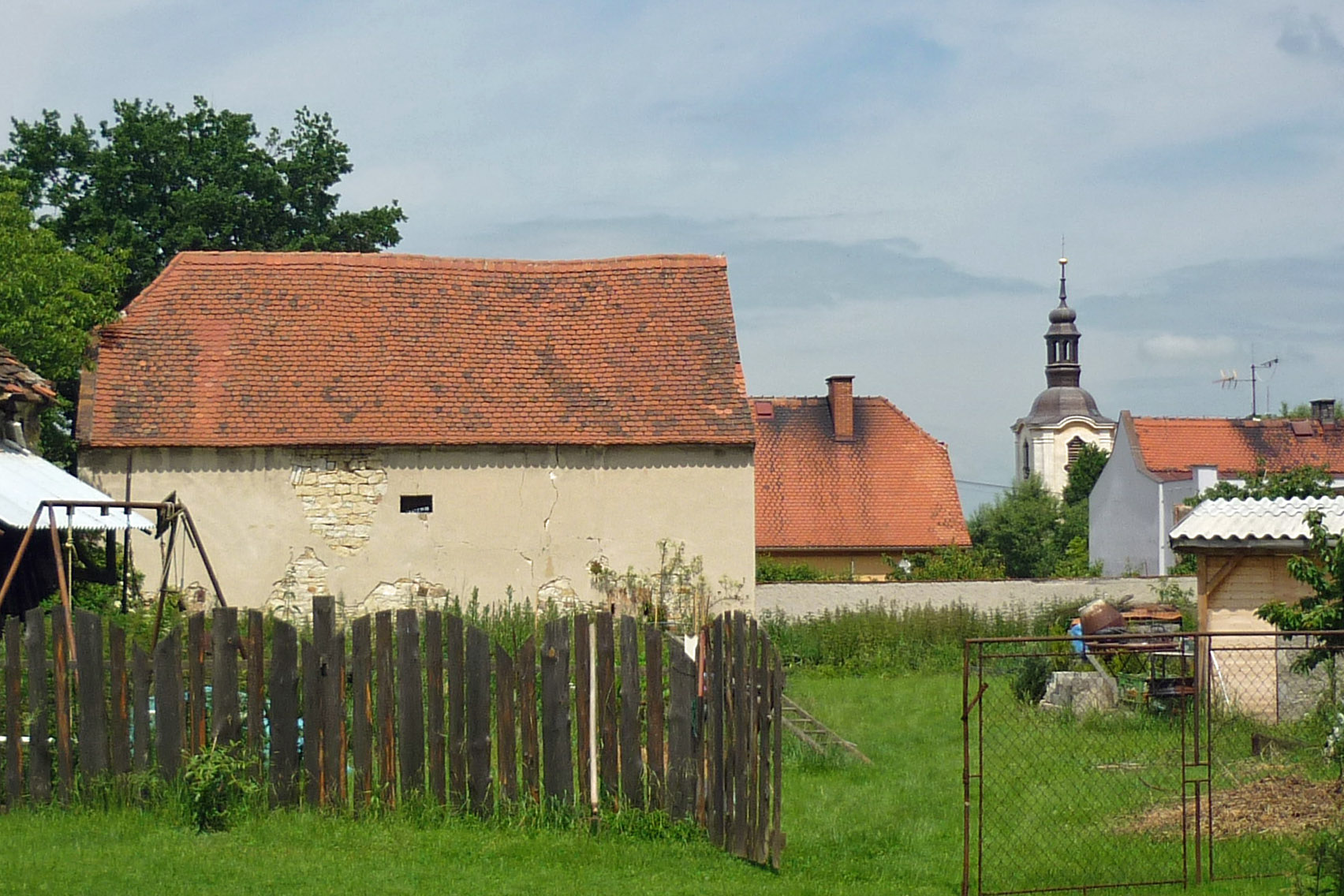 Ehemalige Synagoge in Liebeschitz bei Saaz. Die Jüdische Gemeinde in Liebeschitz bestand bis 1931.